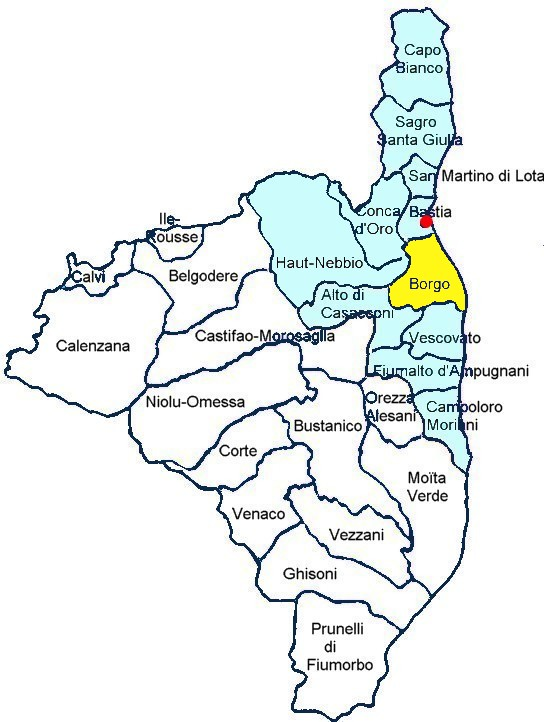 Canton de Borgo, Haute-Corse. Canton électoral en Marana. Corsu: Ghjura eletturale di Marana